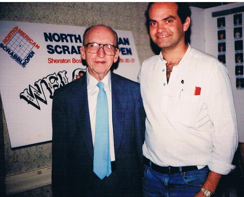 סאם אורבאום (מימין) עם אלפרד באטס, ממציא המשחק סקרבל